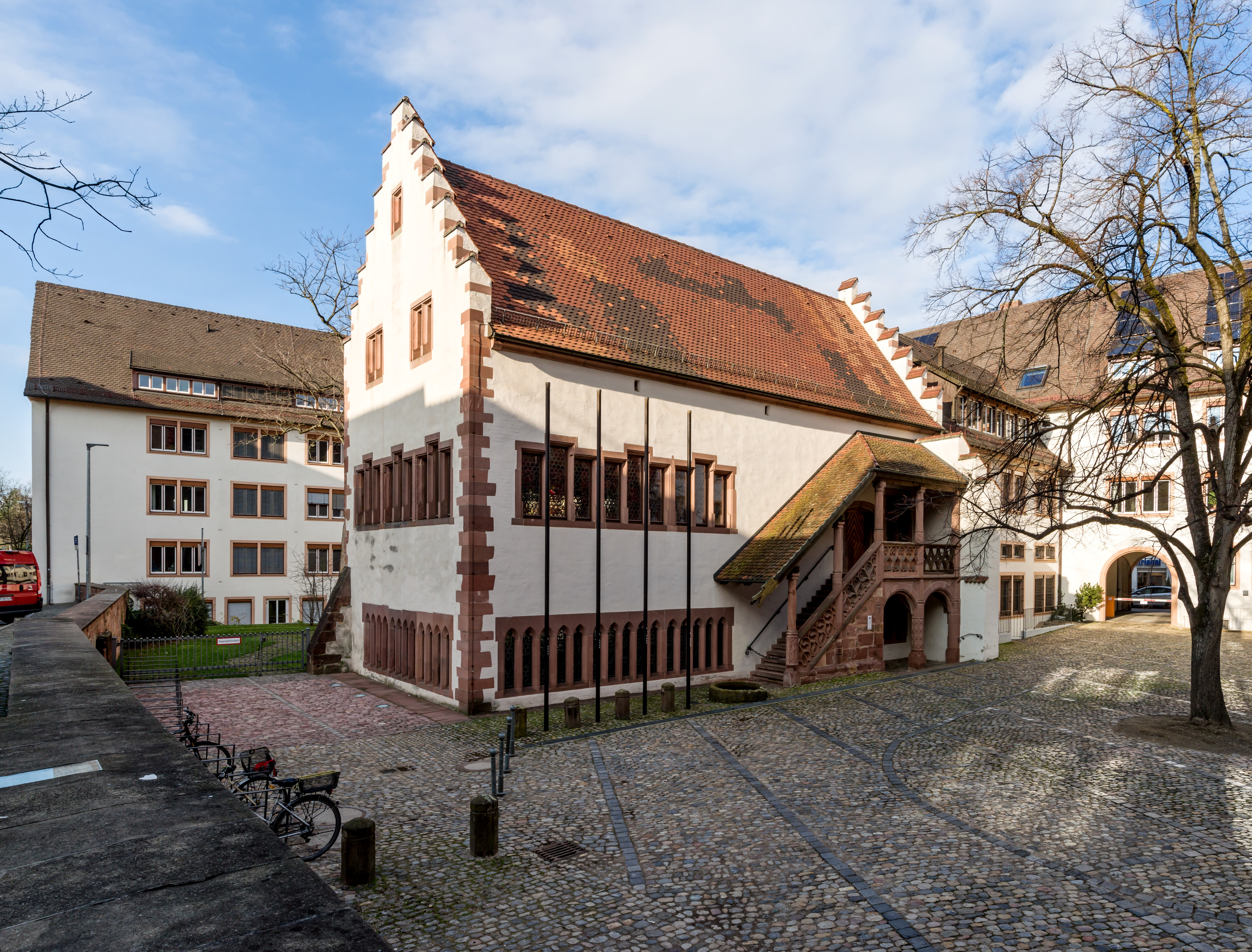 Bilder aus Freiburg